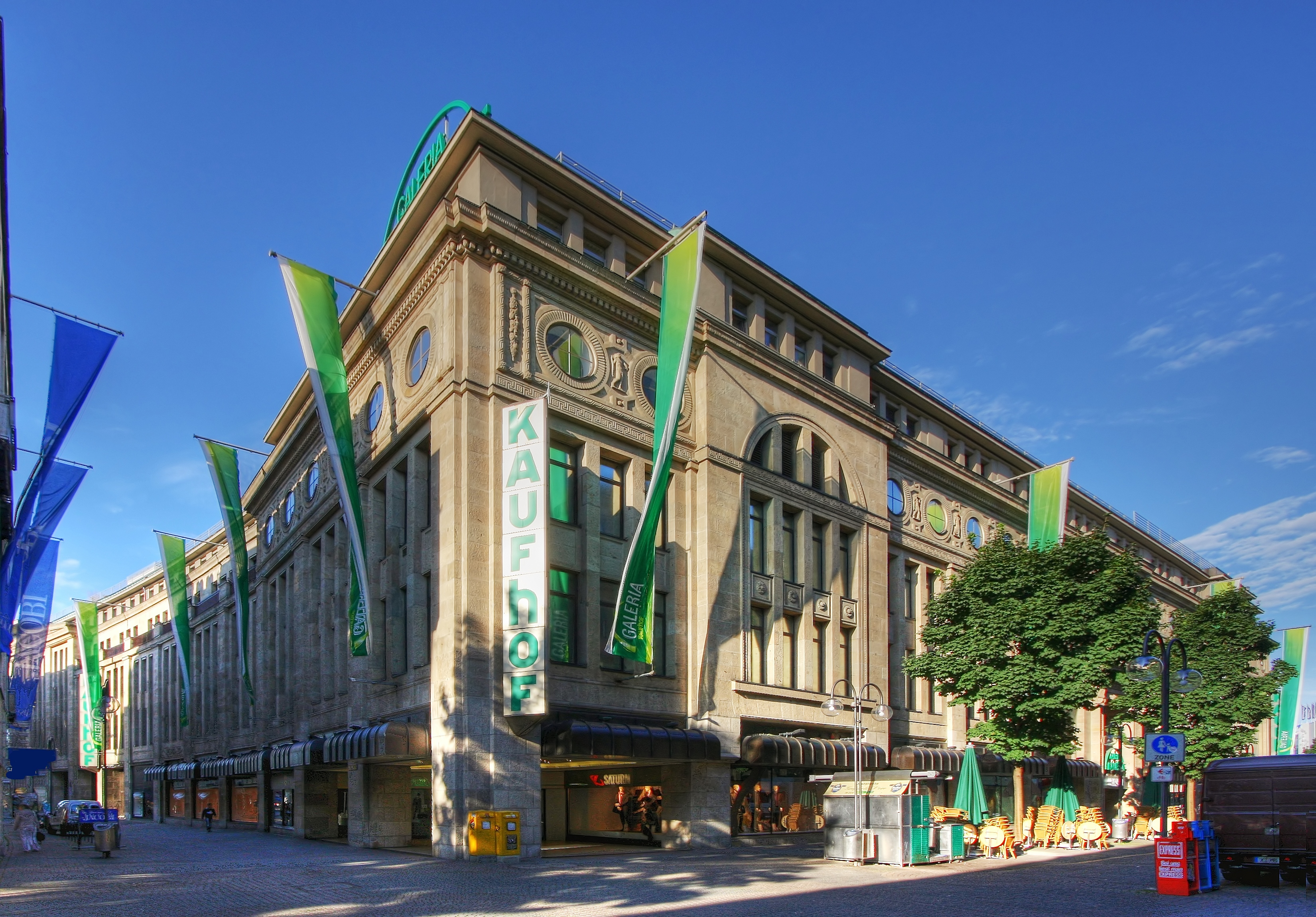 Galeria Kaufhof Köln. Hohe Str./Ecke Gürzenichstr. Ehemals „Warenhaus Leonhard Tietz“ Architekt: Wilhelm Kreis. This is a photograph of an architectural monument.